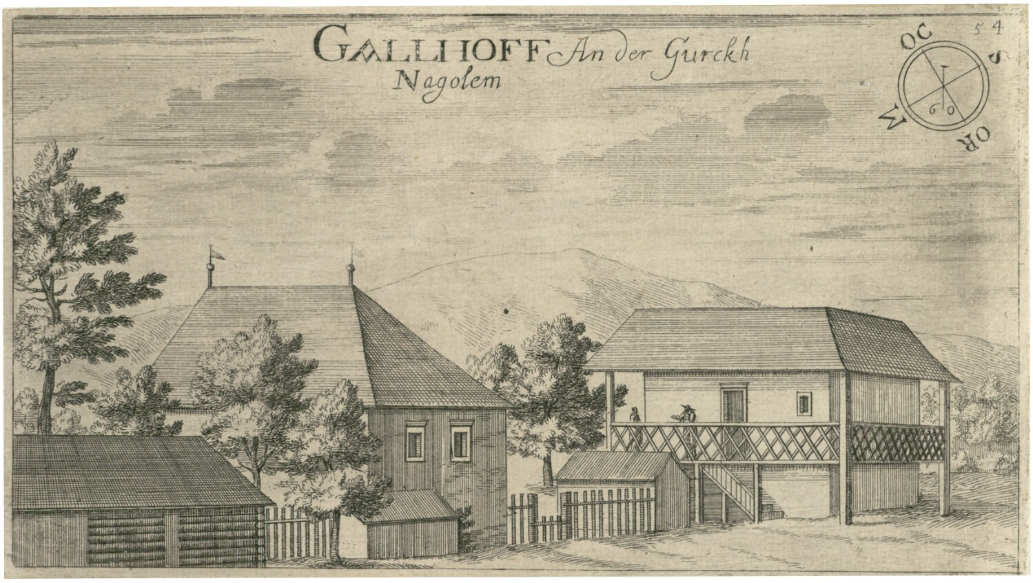 Dvorec Golo (Gallhof)